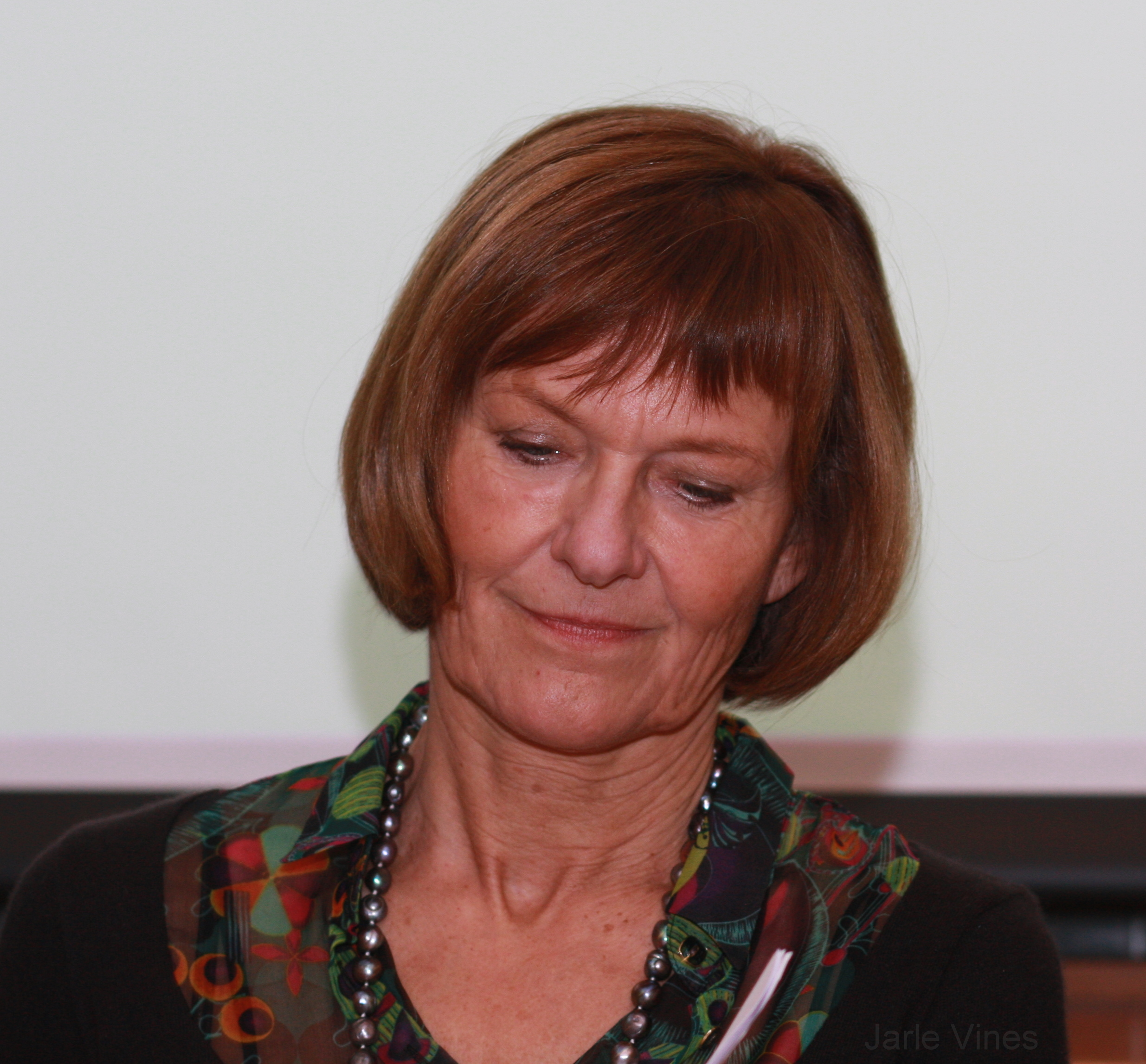 Gro Brækken under topplederkonferansen til Energirike